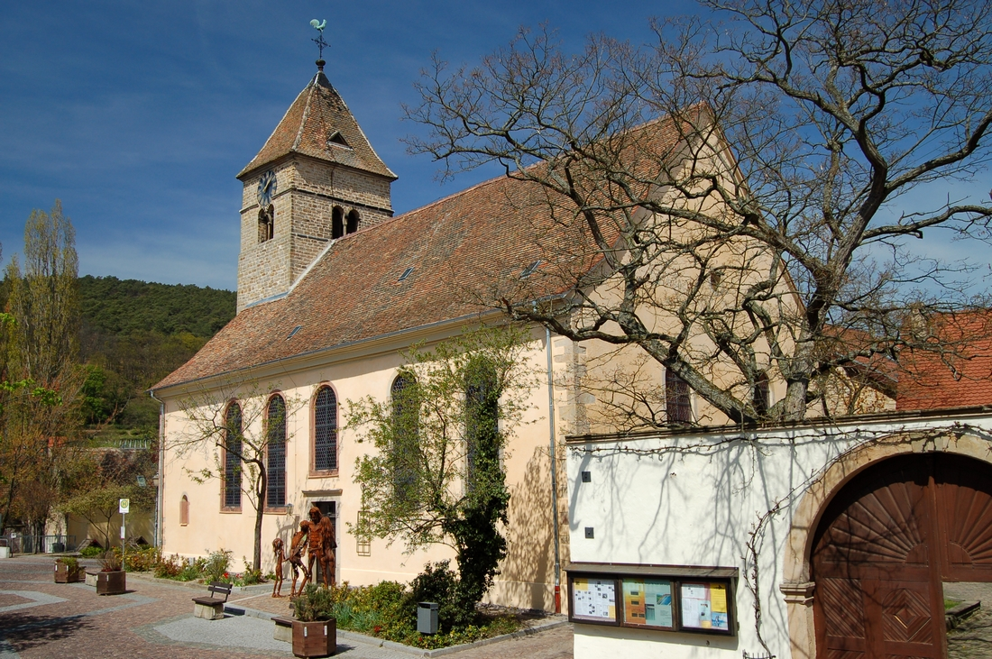 Kirche und Marktplatz in Gimmeldingen